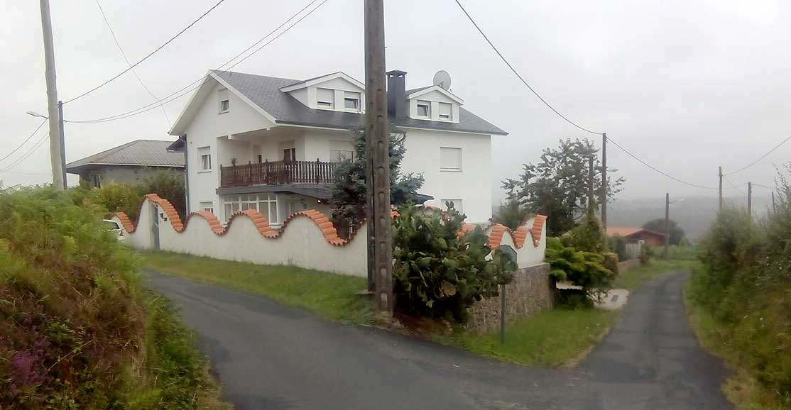 Vista do Corval, O Val.